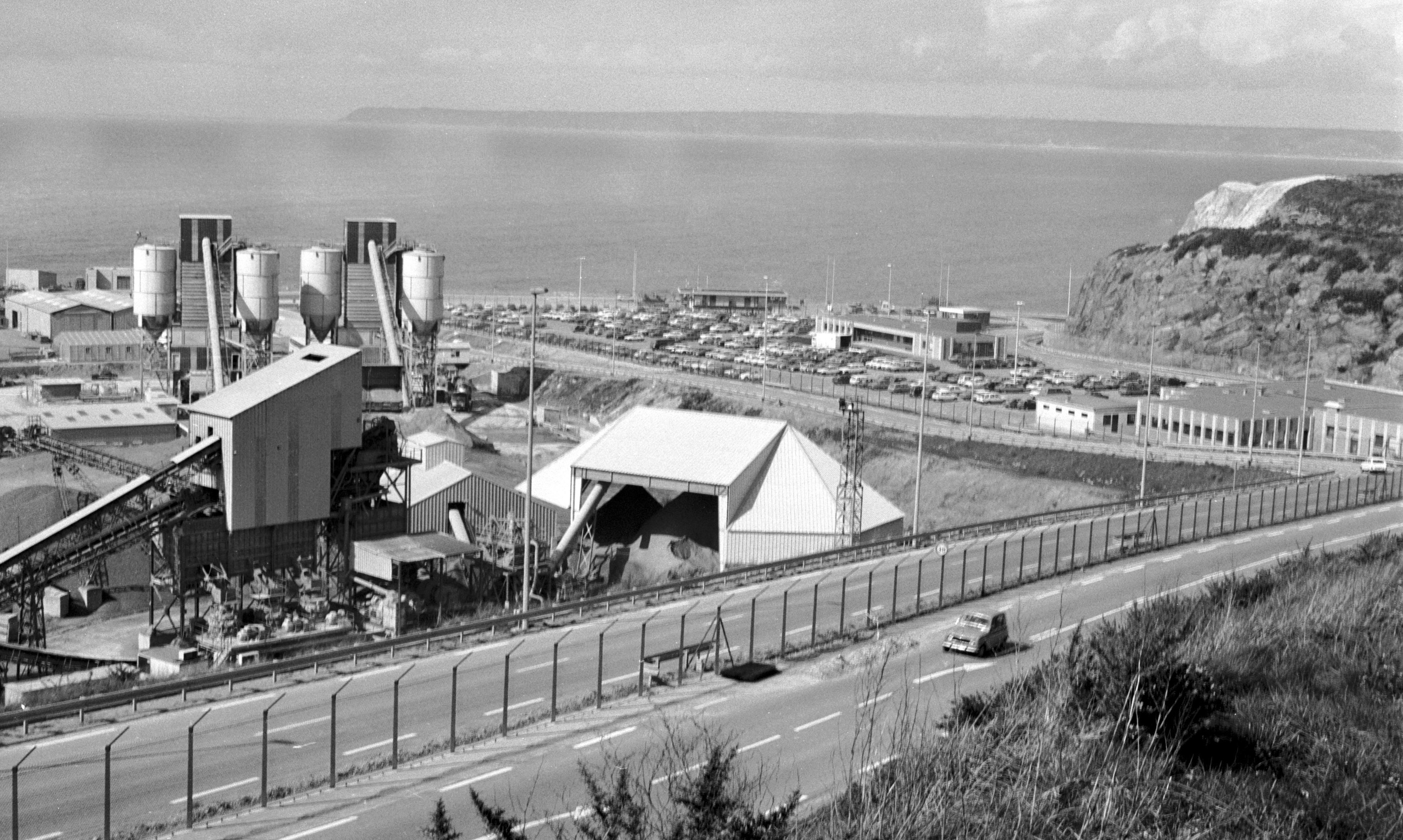 Travaux de construction de la centrale nucléaire de Flamanville (Normandie, France) vers 1980.